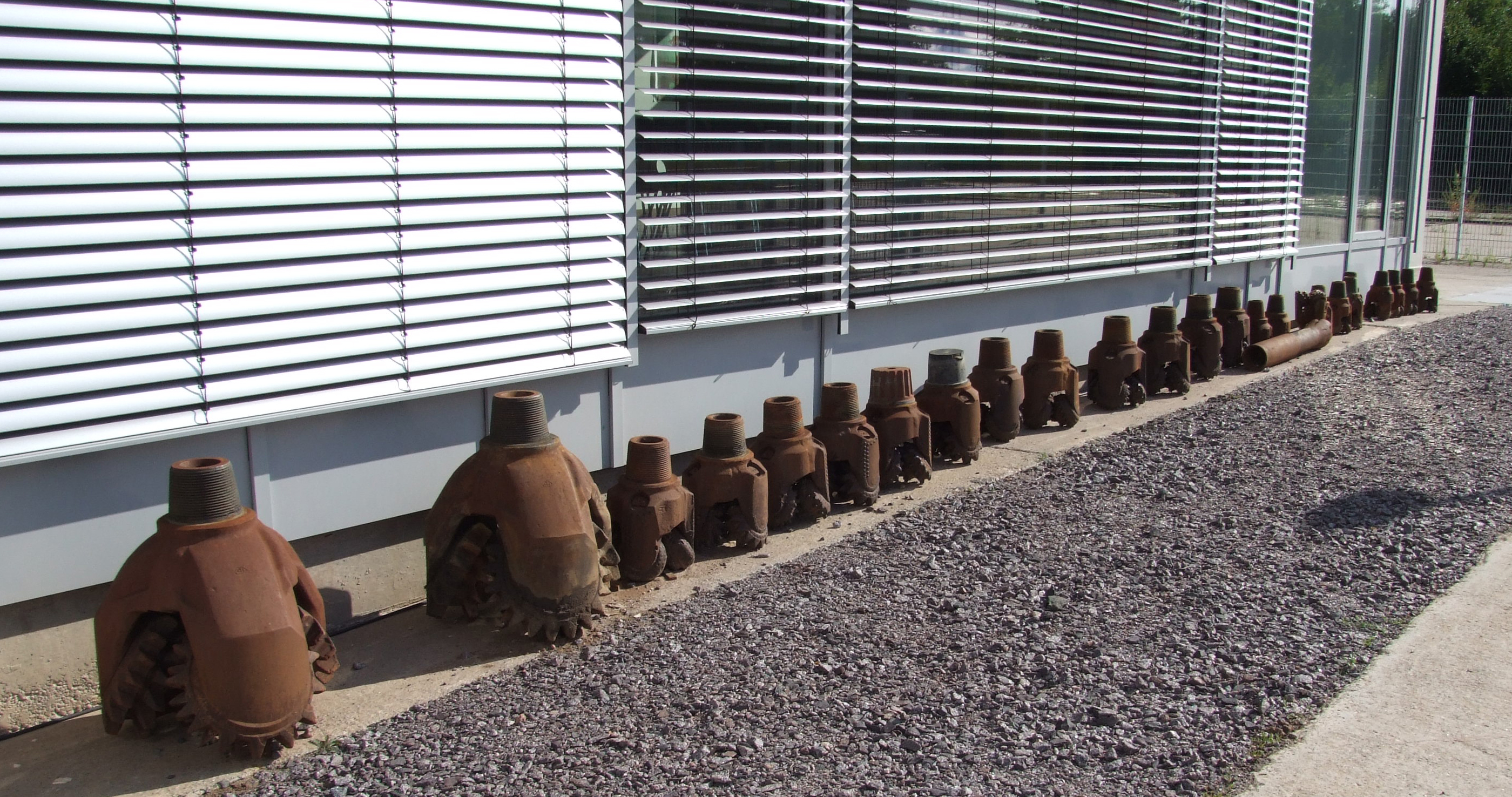 Die bei der Erbohrung der Förder- und Reinjektionsbohrung des Geothermiekraftwerkes Landau verbrauchten Bohrköpfe.